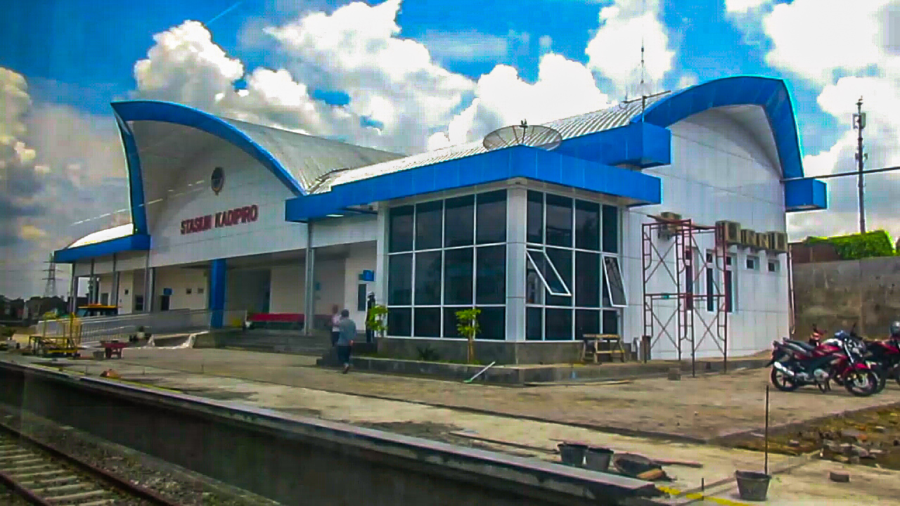 stasiun kadipiro